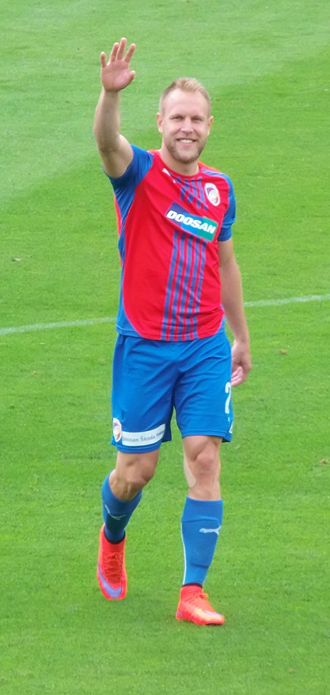 Daniel Kolář - květen 2015